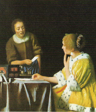 Scan van reproductie. Johannes Vermeer: Dame met dienstmeisje (1666-1667). The Frick Coleection, New York.